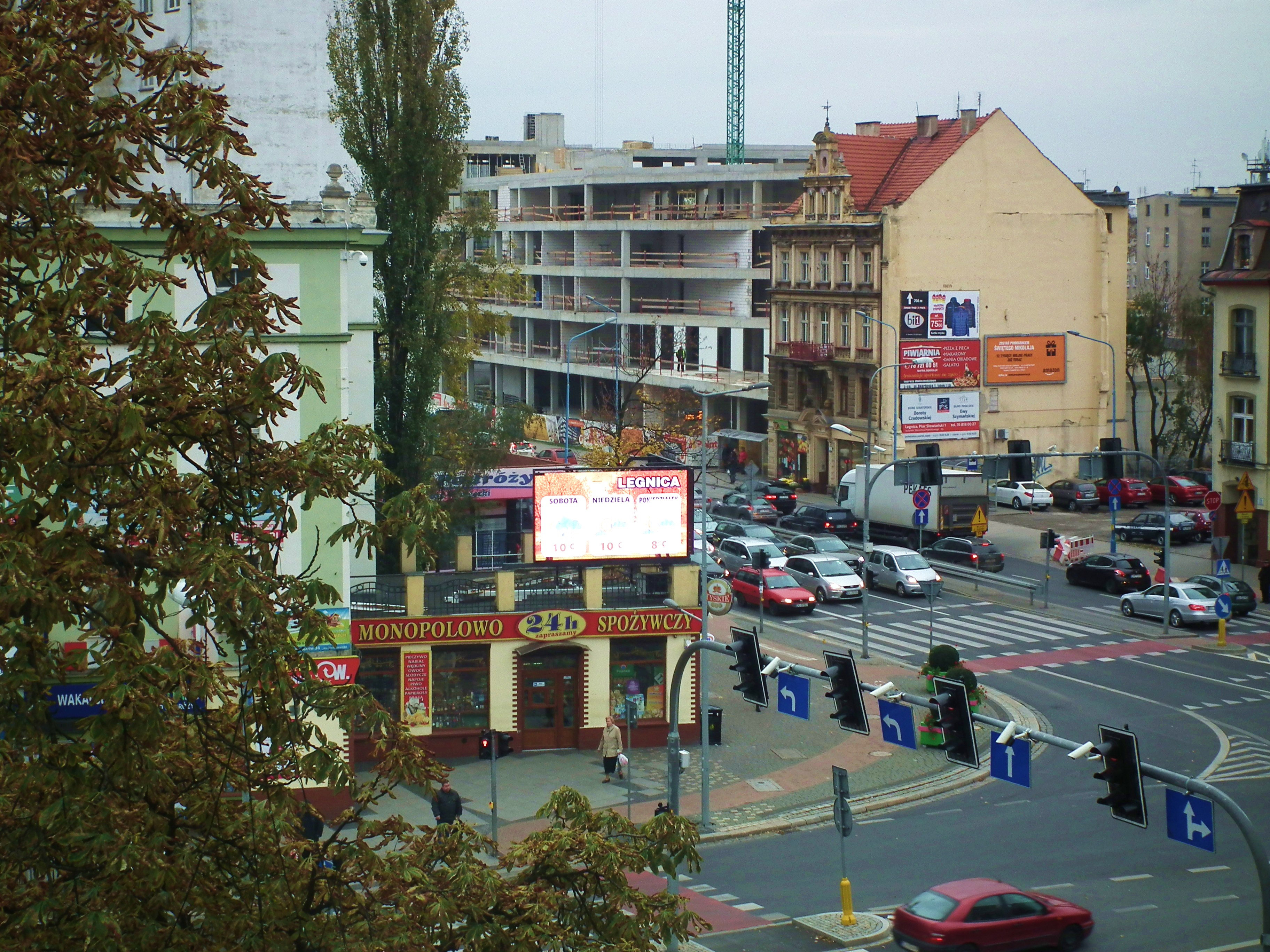 Pejzaż legnicki z ulicy Parkowej.